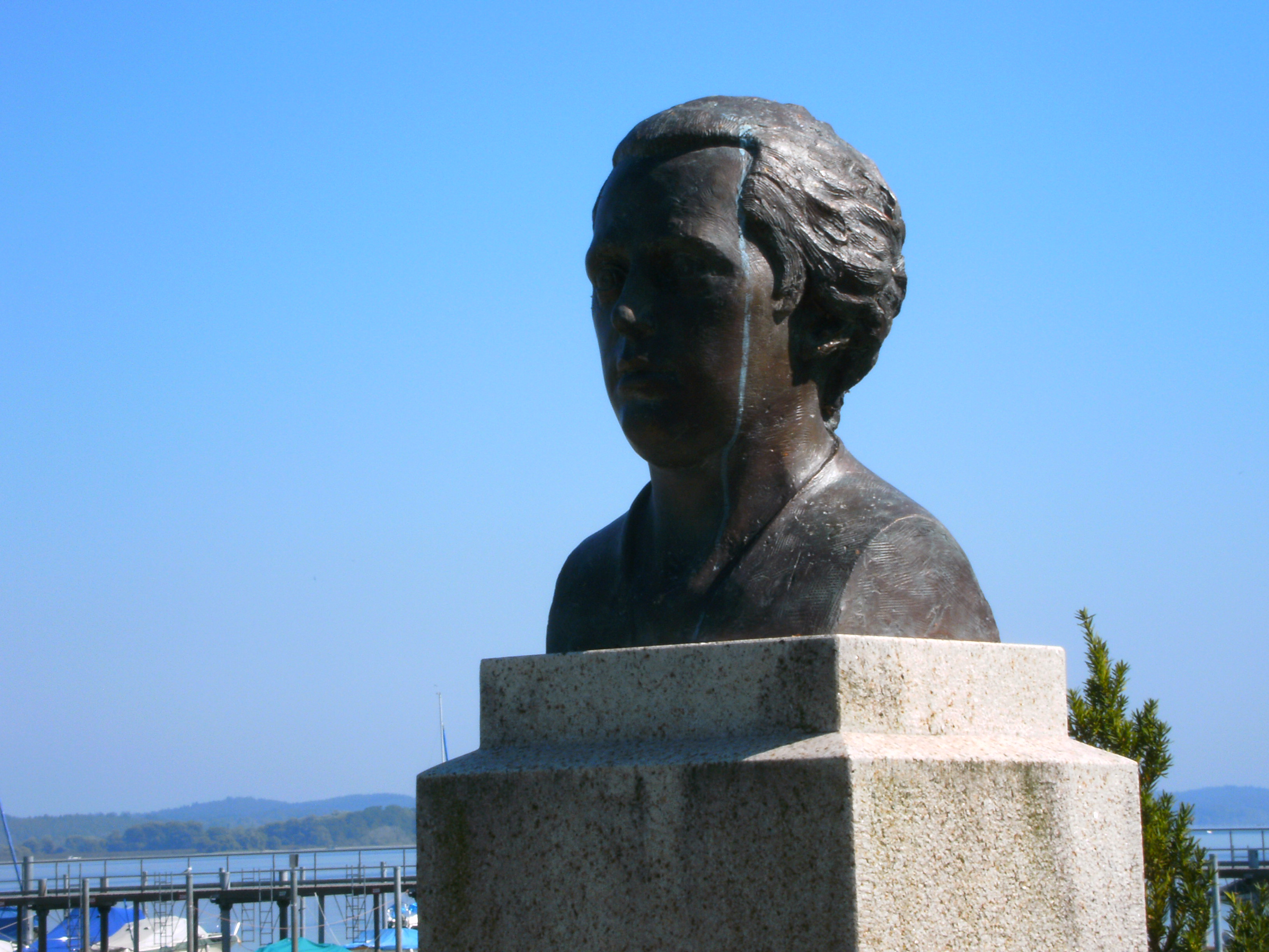 Büste Franz Anton Mesmer, Begründer des Animalischen Magnetismus, Bildhauer: Friedhelm Zilly, Standort: Uferpromenade von Moos-Iznang(Bodensee). Iznang ist der Geburtsort von Franz Anton Mesmer.